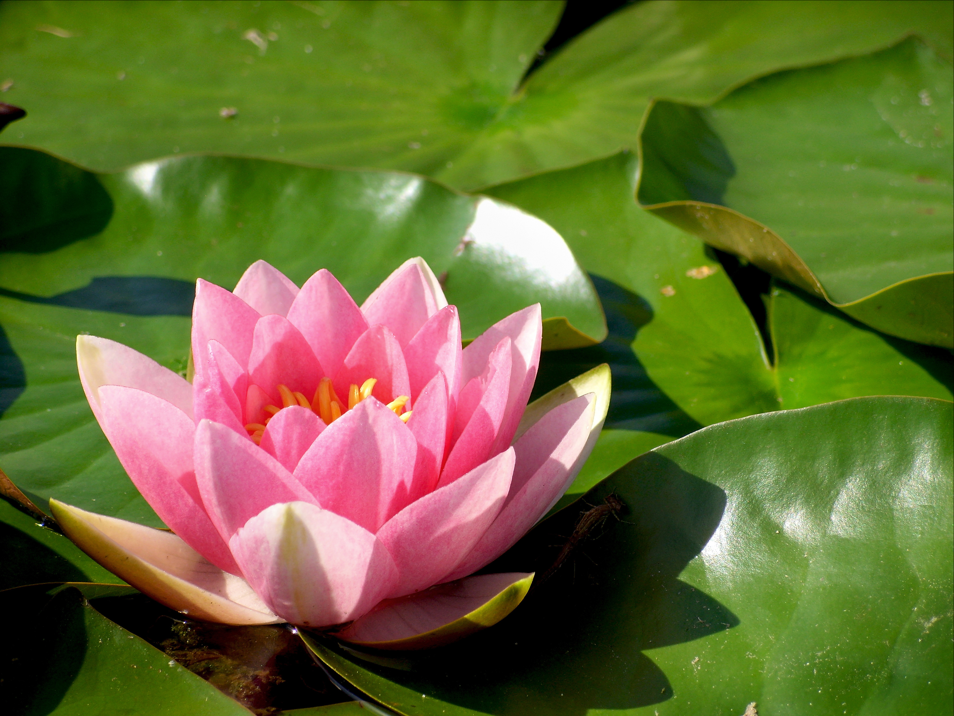 Grzybień biały o zabarwieniu różowym.